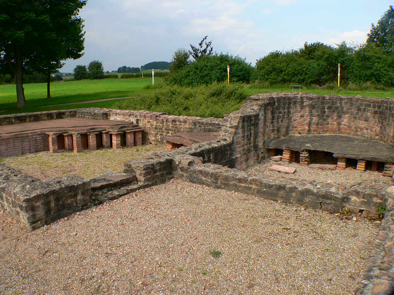 Römische Villa Haselburg im Odenwald, Hessen, Herrenhaus-Fundamente